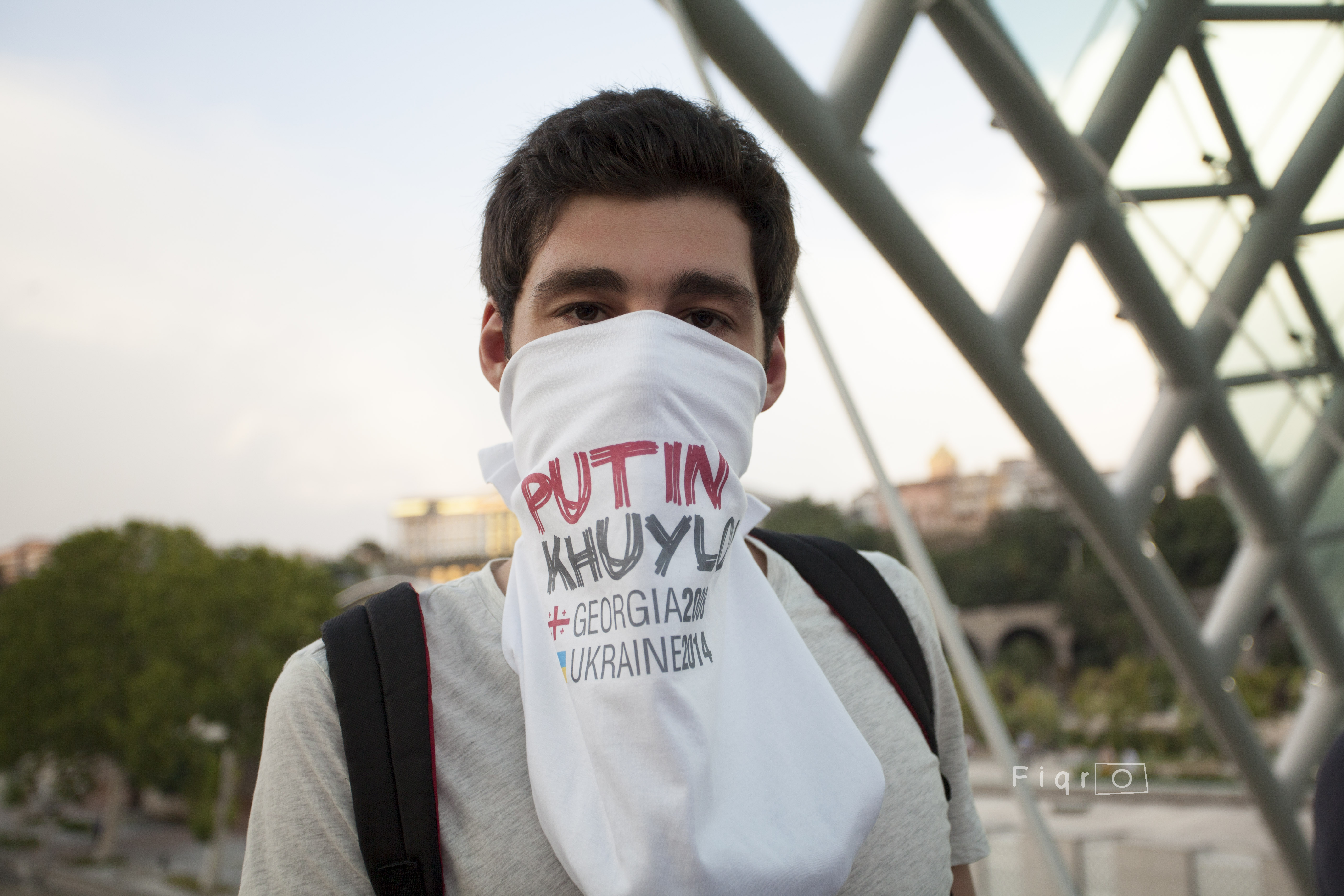 პუტინ ხუილო, აქცია თბილისში.